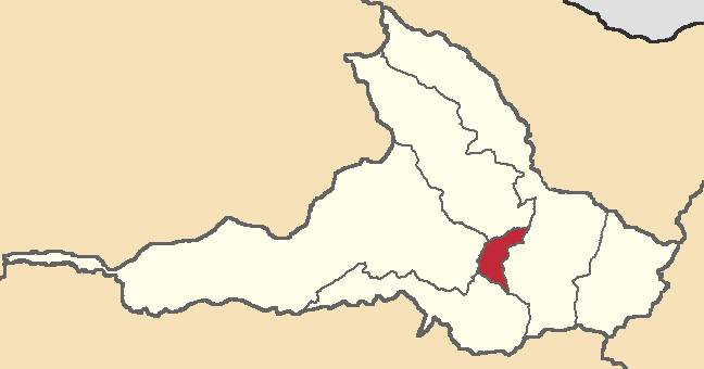 Mapa localizacor del cantón Antonio Ante, Imbabura, Ecuador